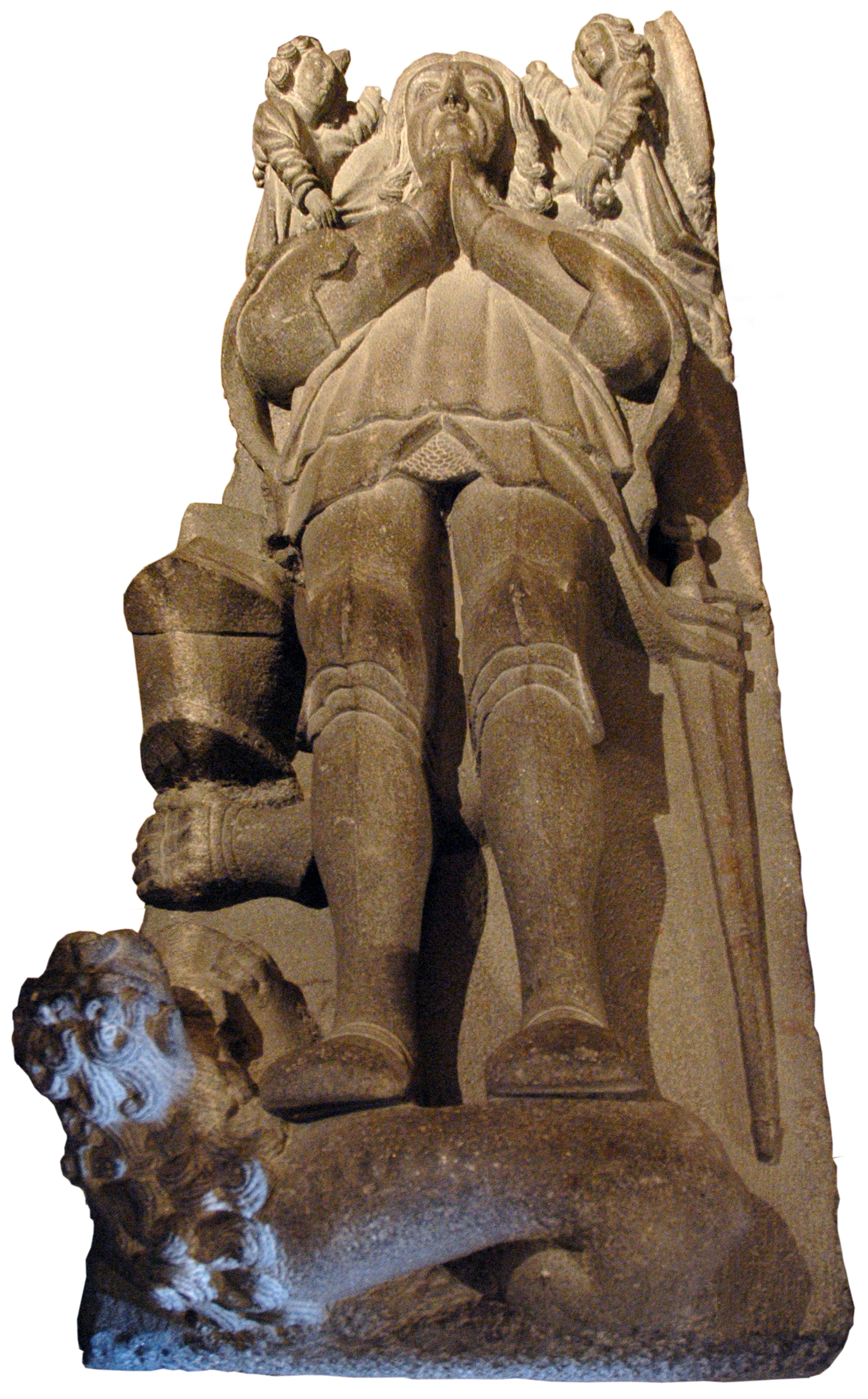 Gisant de Gilles de Texue (1478 - 1514) en pierre de Kersanton